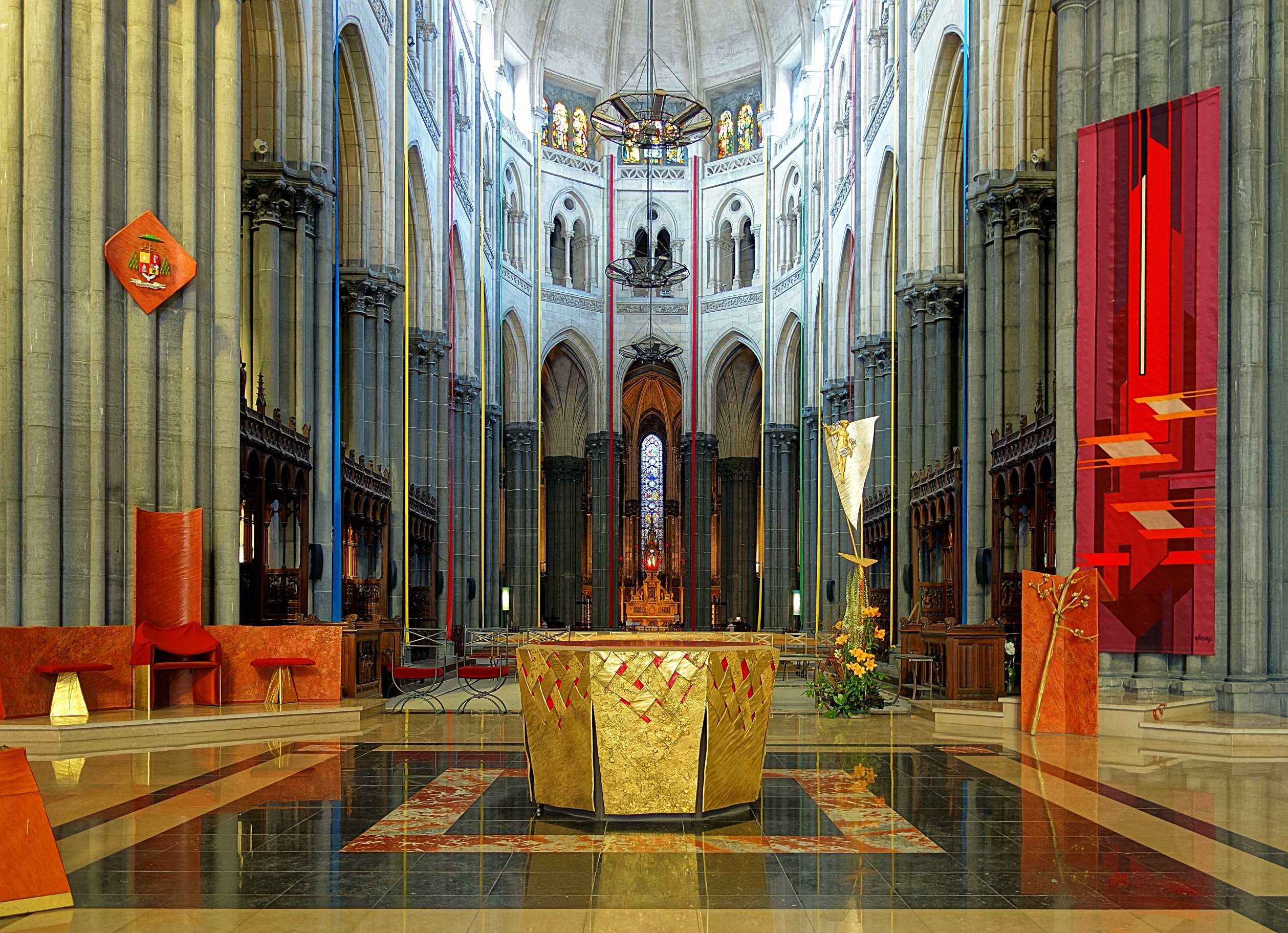 Le chœur de la Cathédrale Notre-Dame-de-la-Treille à Lille.